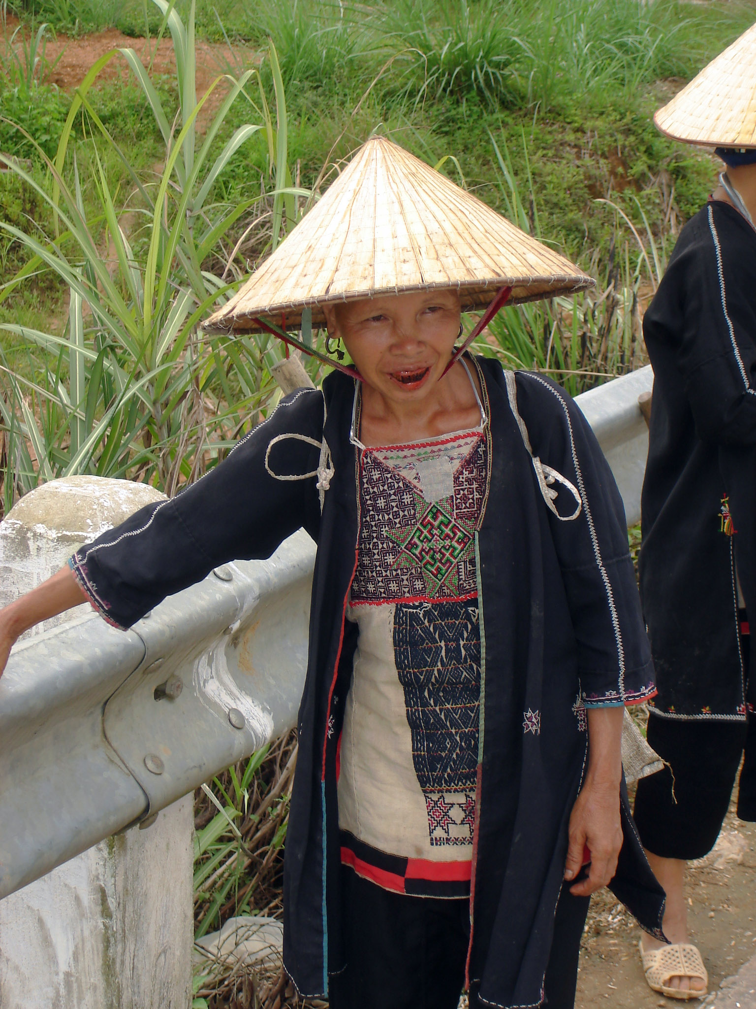 Eine Weisse Dao (Yao) mit geschwärzten Zähnen (Nord-Vietnam)